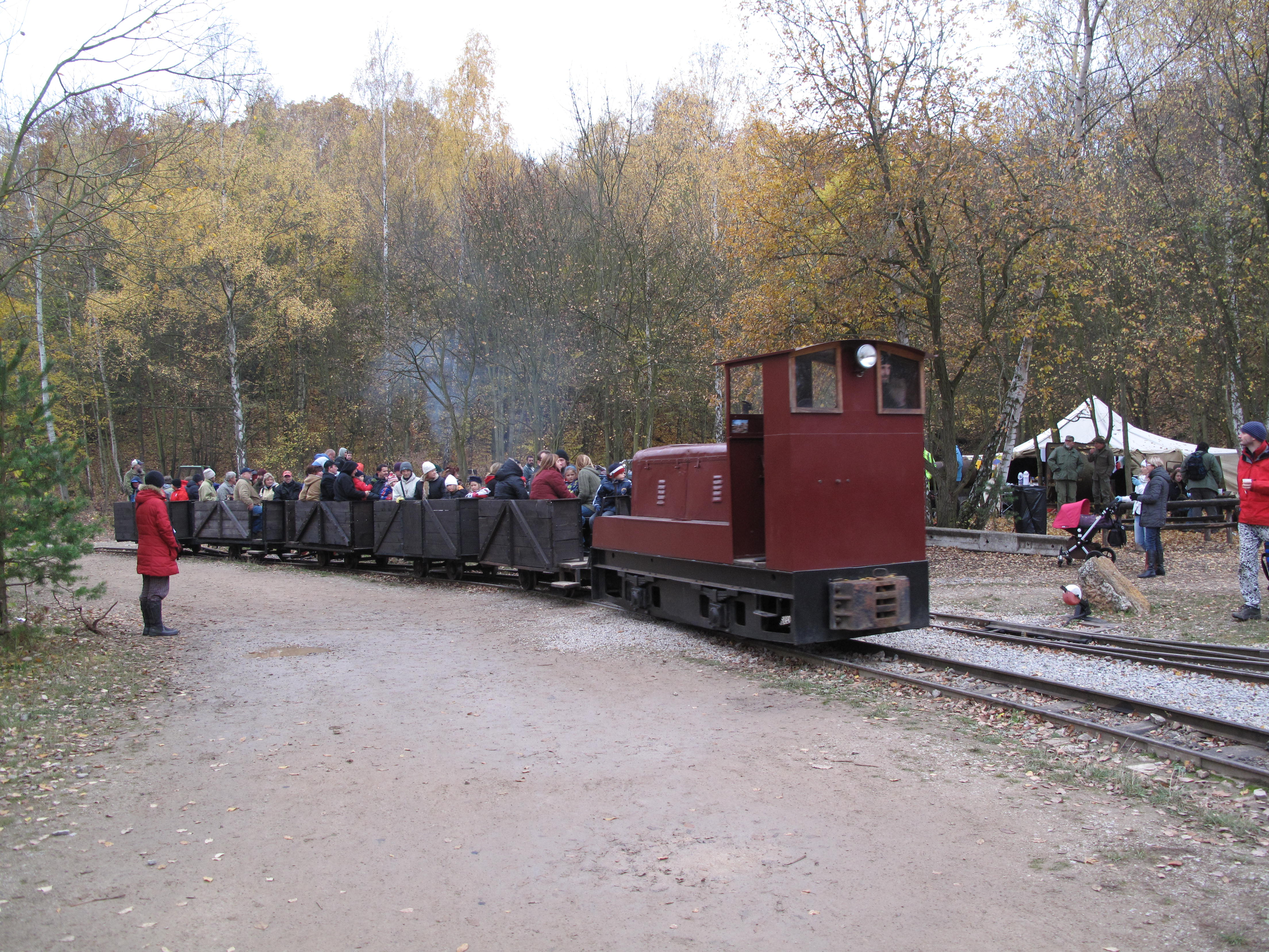 Česky: Lokomotiva BNE50